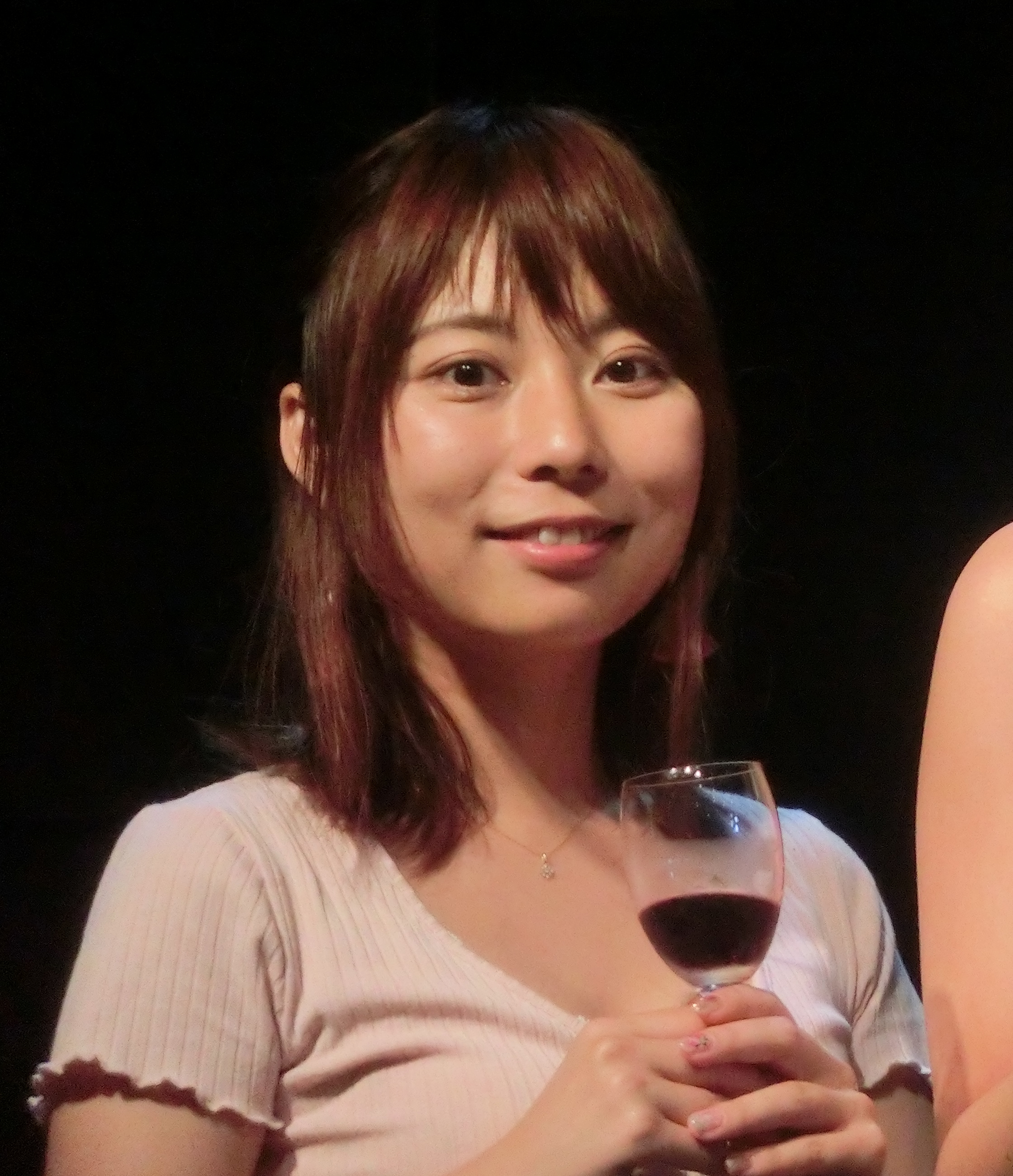 SHIBUYA LOFT 9